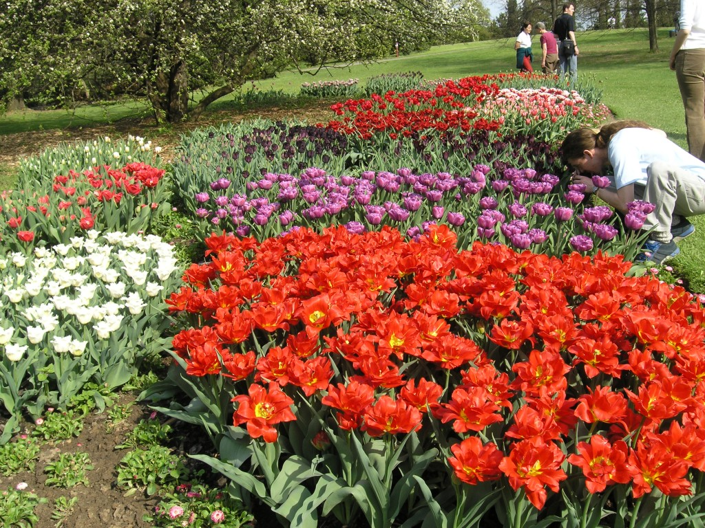 na přelomu dubna a května probíhají v Dendrologické zahradě výstavy tulipánů